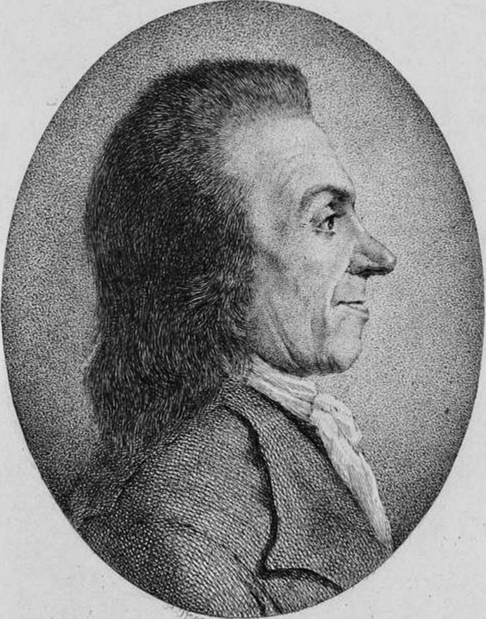 Heinrich Pfenninger (1749–1815): Johann Heinrich Pestalozzi (1746–1827), Verfasser von "Lienhart und Gertrud" (1781–1787). Signiert, undatiert. Zentralbibliothek Zürich, Pestalozzi, Heinrich (a) I, 13a, / Public Domain Mark